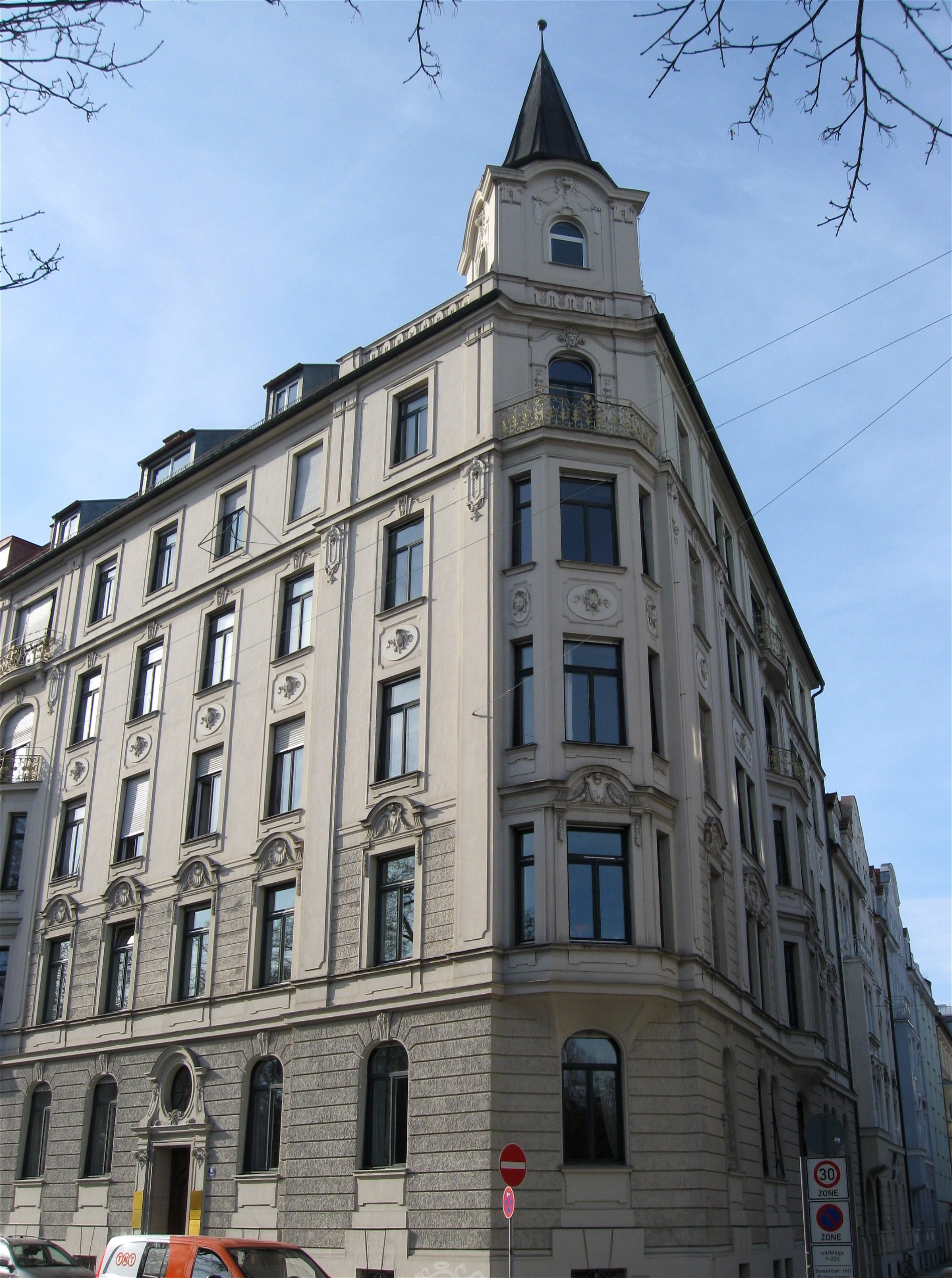 Widenmayerstraße 6; Mietshaus, stattlicher Neubarockbau, mit reicher Gliederung und Stuckdekor, 1898-1900 von Franz Hammel; symmetrisch komponierte Gruppe mit Nr. 4 und 5.